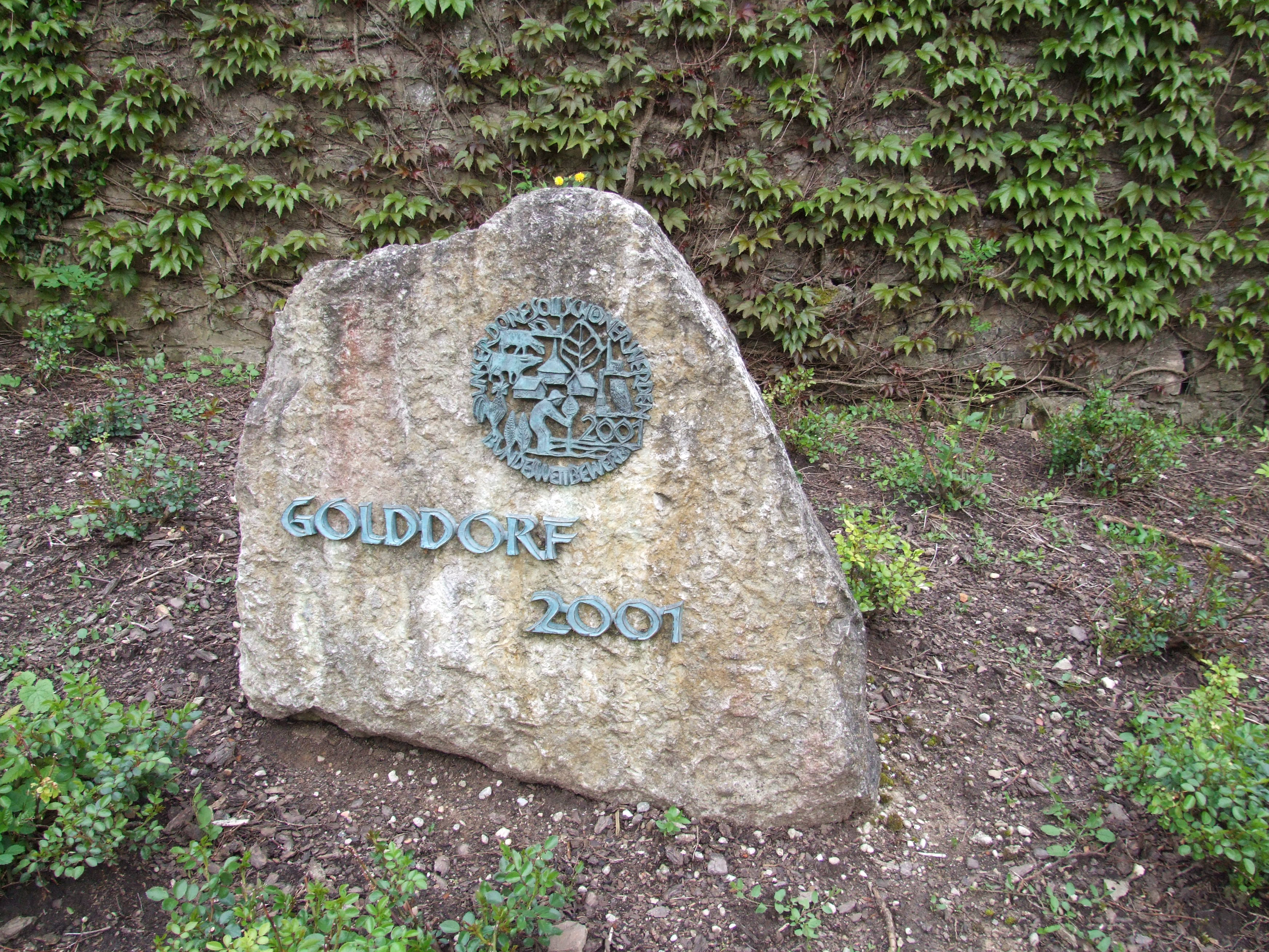 Ehrenstein Niedergailbach - Golddorf 2011 - für die Goldmedaille beim Bundeswettbewerb "Unser Dorf soll schöner werden."